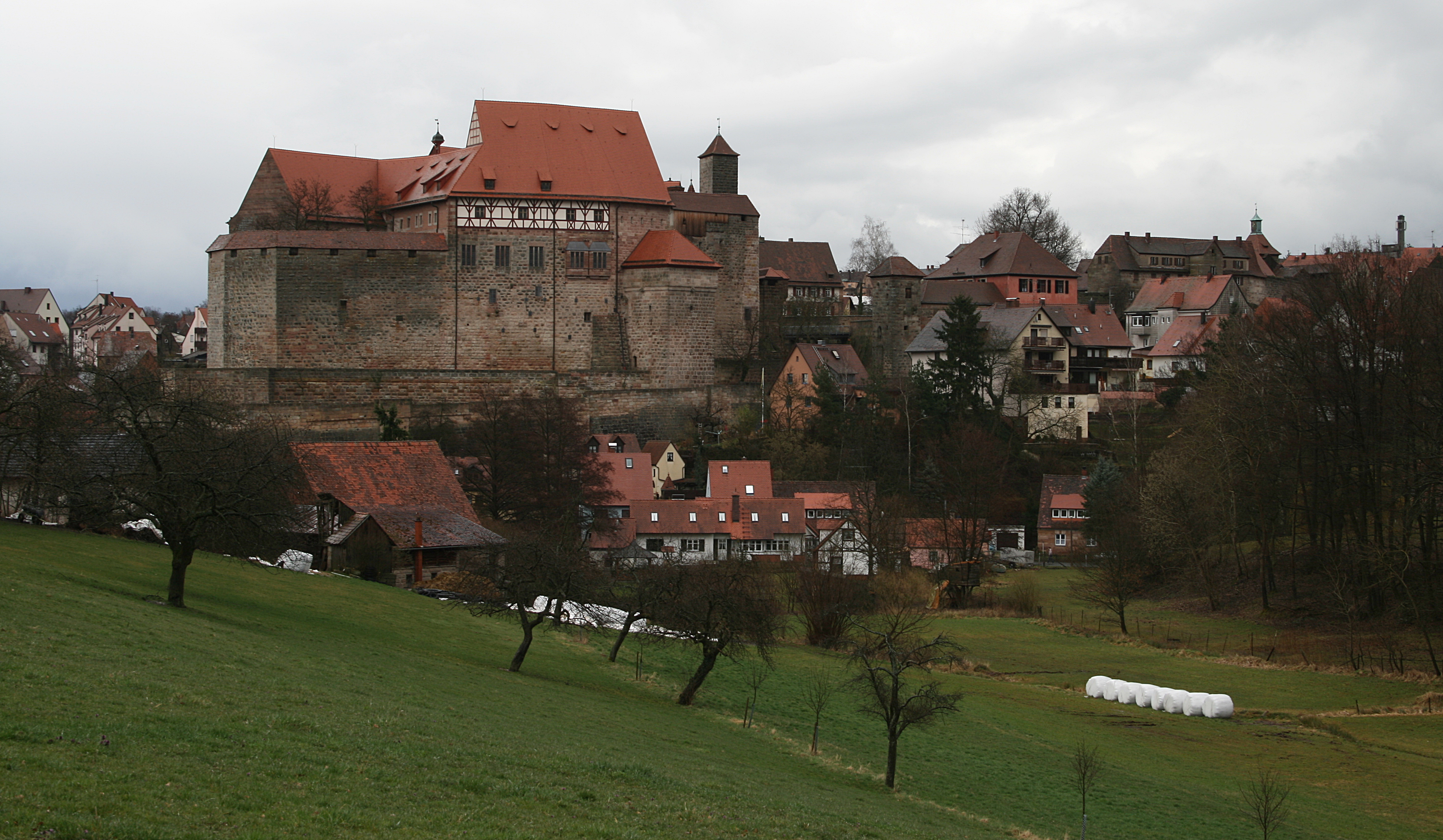 Die Cadolzburg von Westen